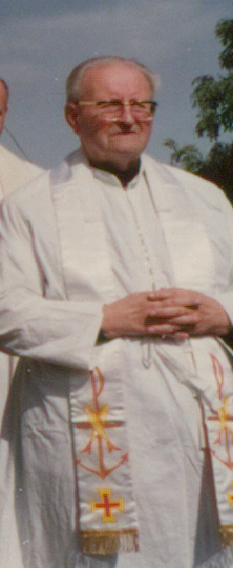 Děkan z Libochovic Václav Lochman